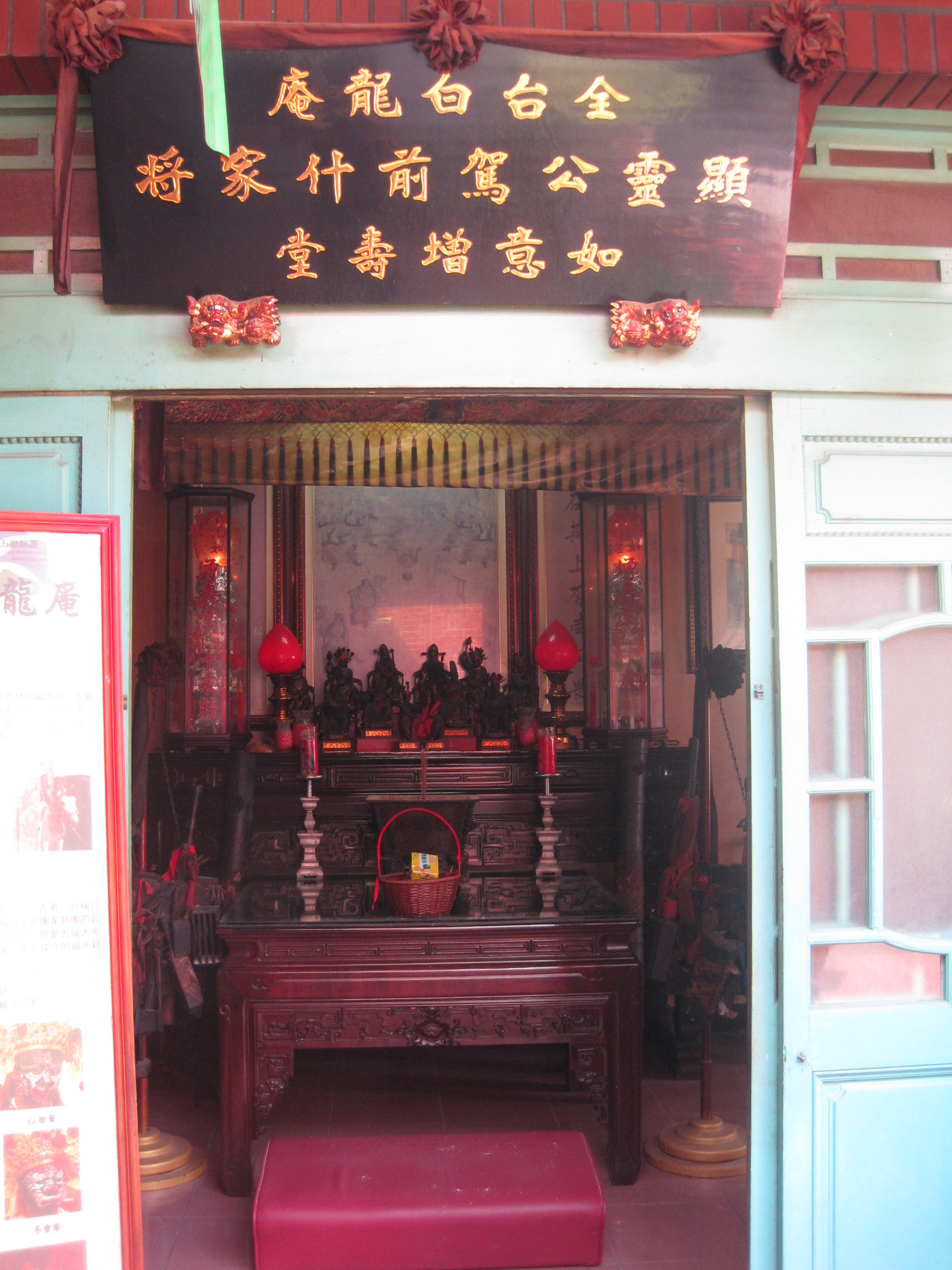 白龍庵如意增壽堂